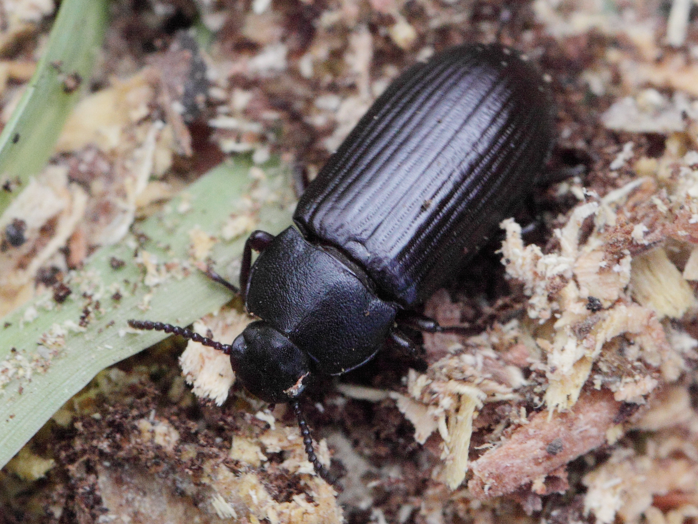 E-Germany, Brandenburg: Küstrin-Schwedt (Oder), 30.09.2012 IMG_2394